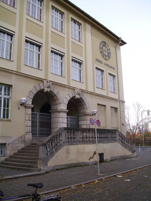 Haupteingang des Dürer-Gymnasiums im November 2009